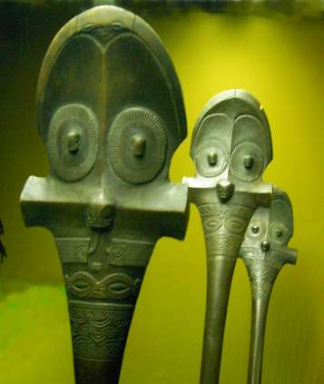 U‘u-Kriegskeulen von den Marquesas-Inseln (Museum of Natural History, New York City). Die U‘u-Kriegskeulen waren persönlicher Besitz der Angehörigen einer exclusiven Kriegerkaste. Jede Waffe wurde für ihren Besitzer persönlich nach Maß gefertigt, sie reichte von der Achselhöhle bis zum Boden. Die geschnitzten Muster sind - trotz gleichförmigen Gesamtbildes - in den Details verschieden, sodass jedes Exemplar einzigartig ist.